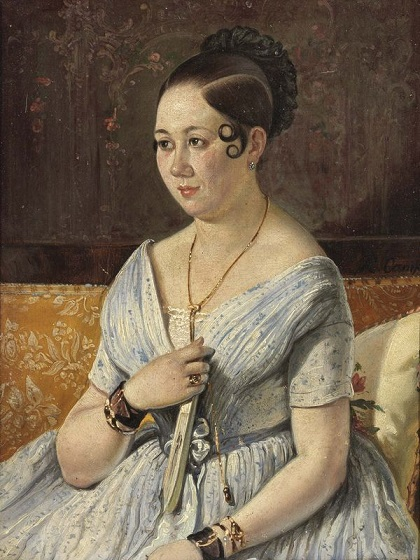 Eitratto di dama, olio su tela, 22 x 17,3 cm., coll. privata